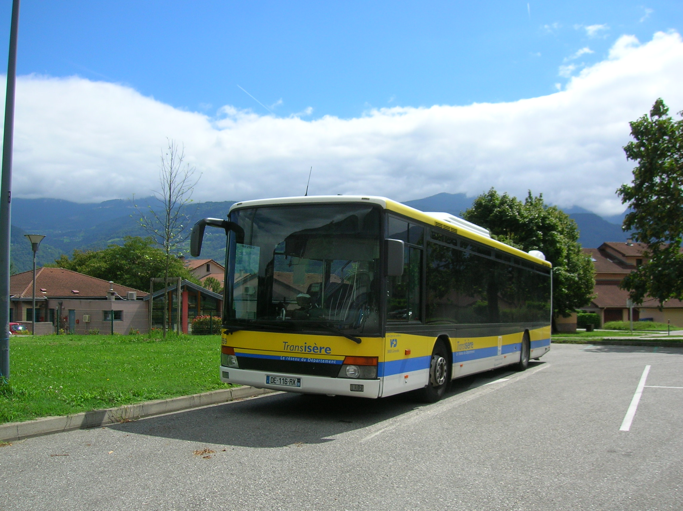 Crolles, Isère, France. car transisère dans le parking du gymnase Léo Lagrange